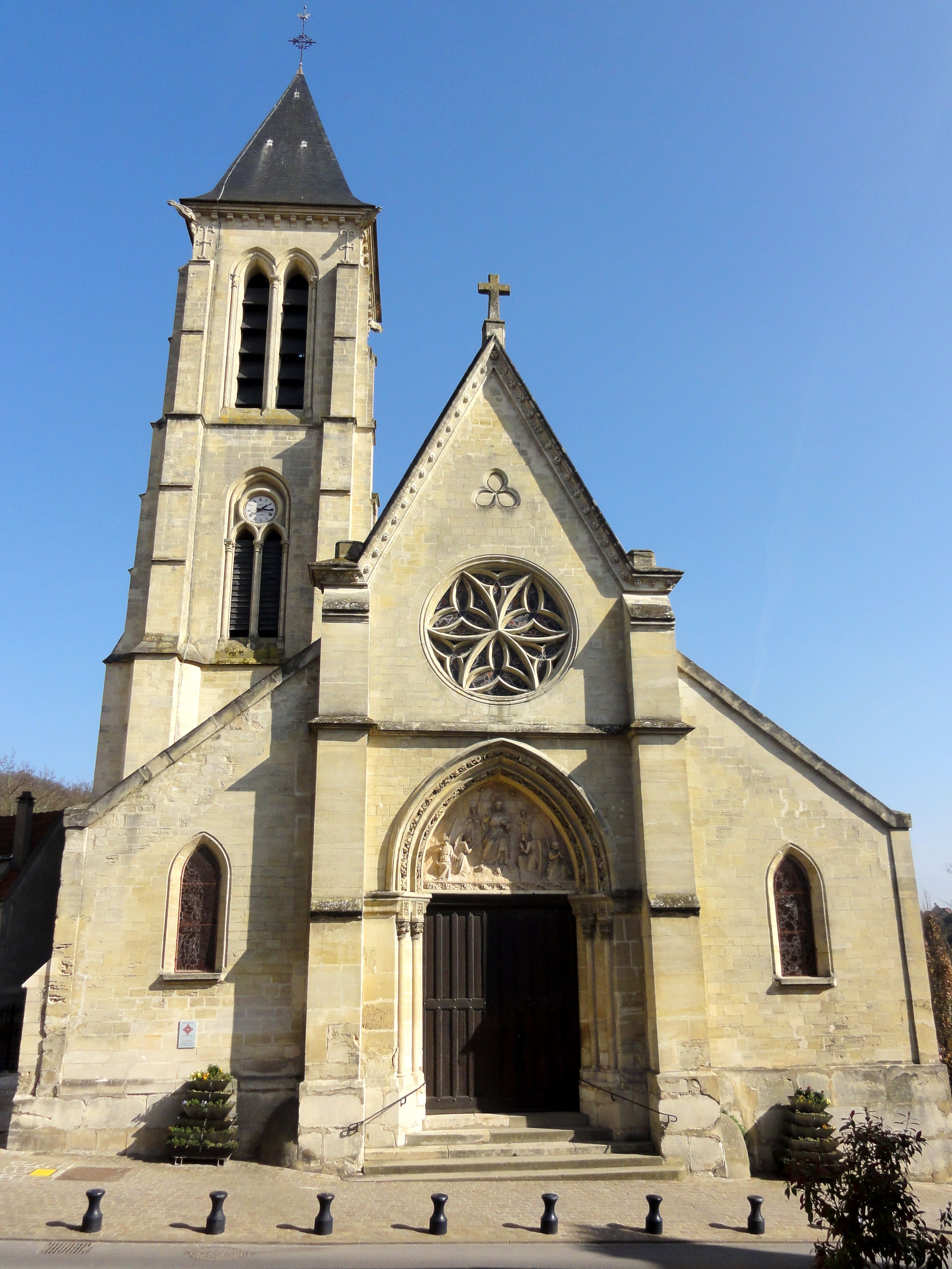 Façade occidentale.